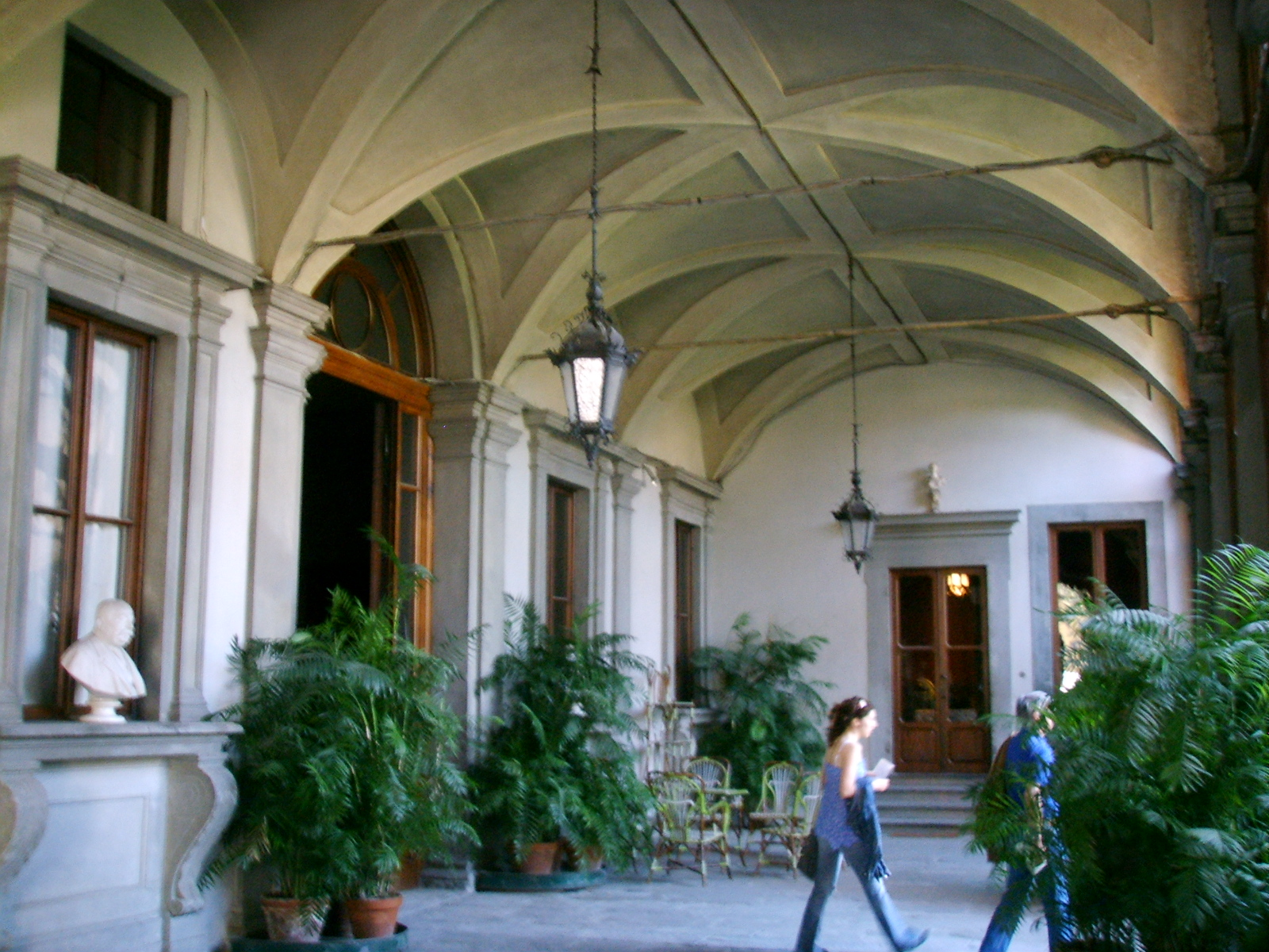 see description